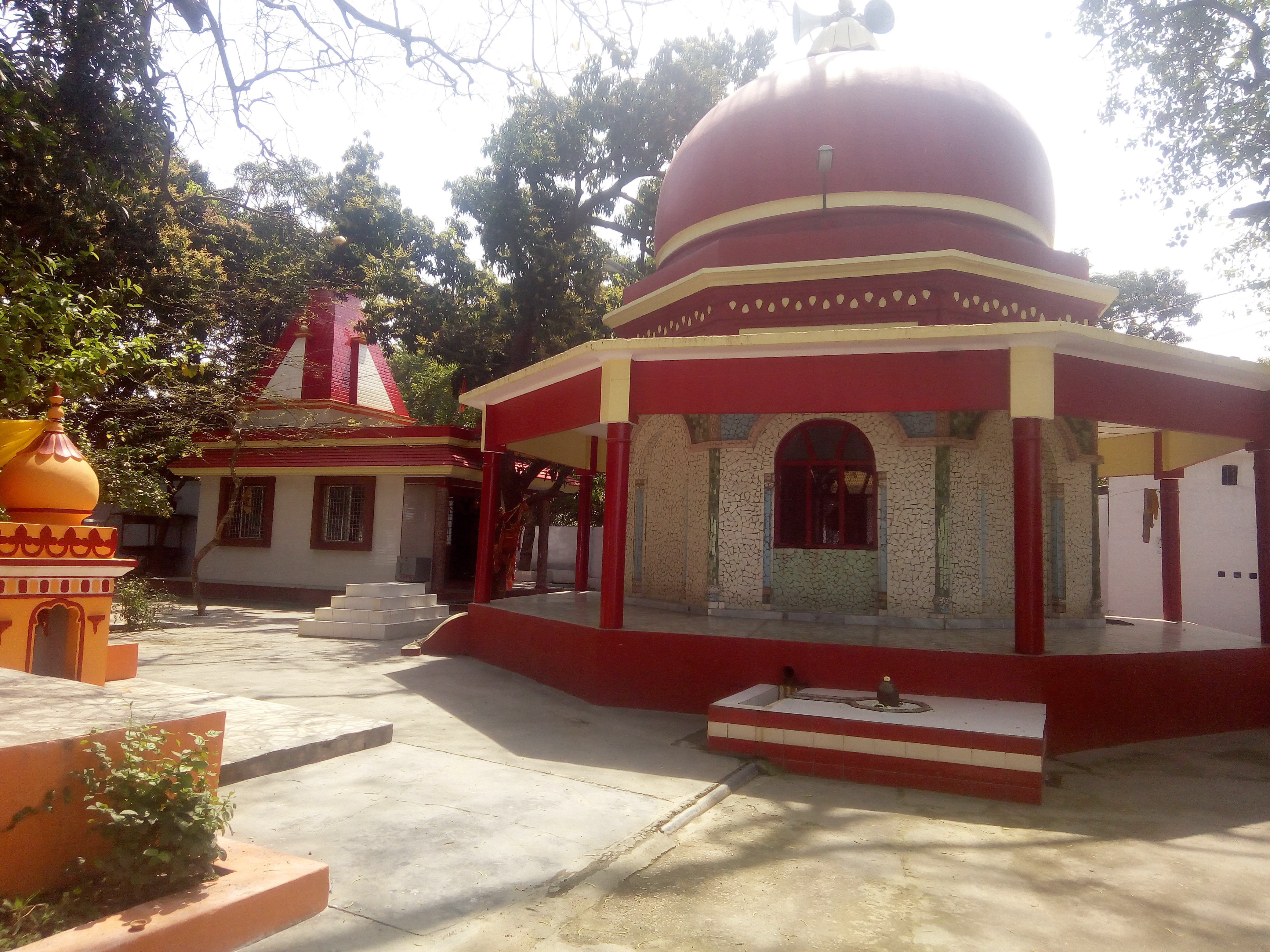 मनकामेश्वर महादेव, पीलीभीत।